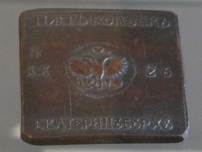 Медные "платы" — первые деньги, выпущенные Екатеринбургским монетным двором. Данная монета изготовлена в 1726 году.